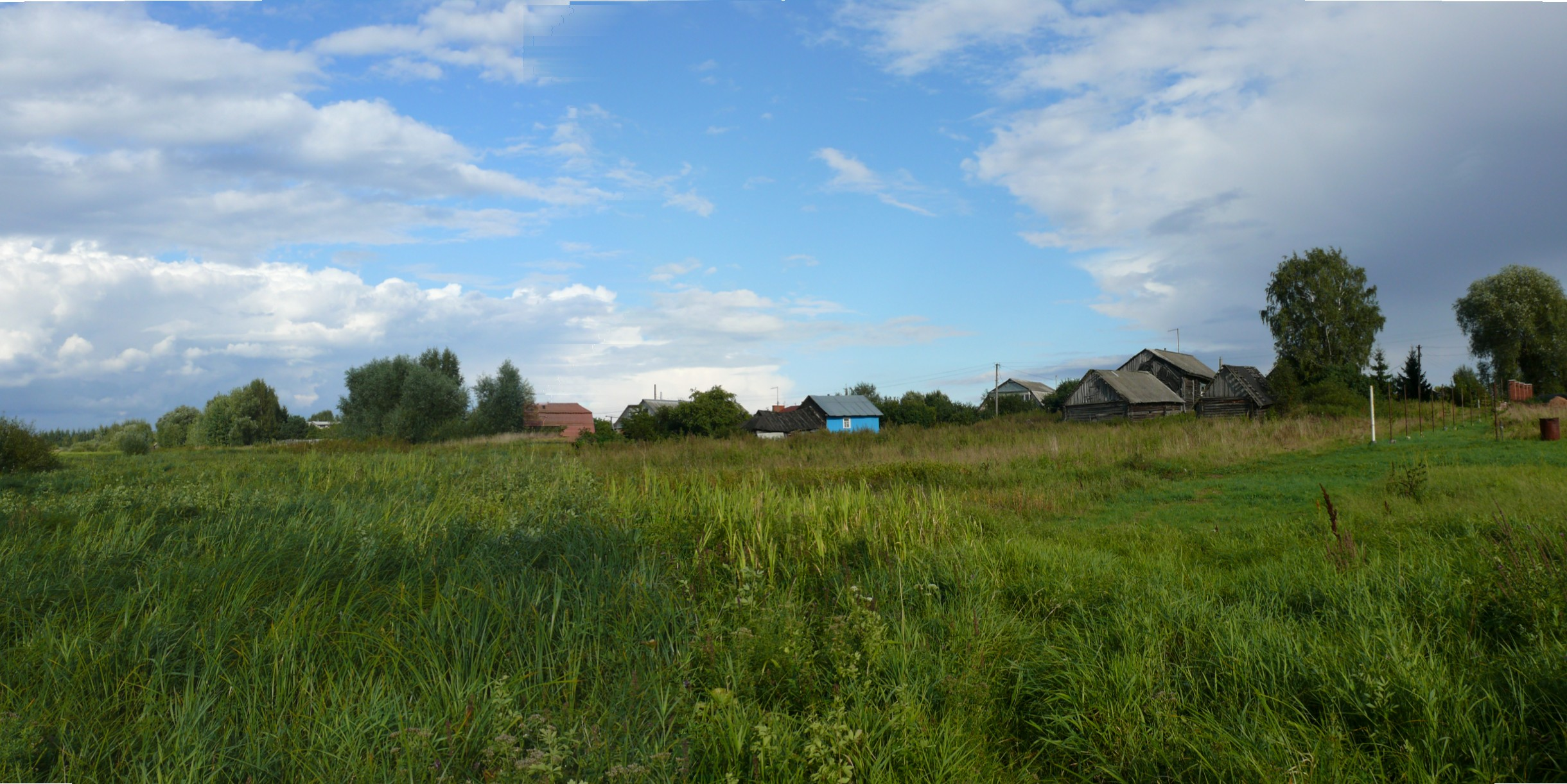 Деревня Георгий в Новгородском районе Новгородской области